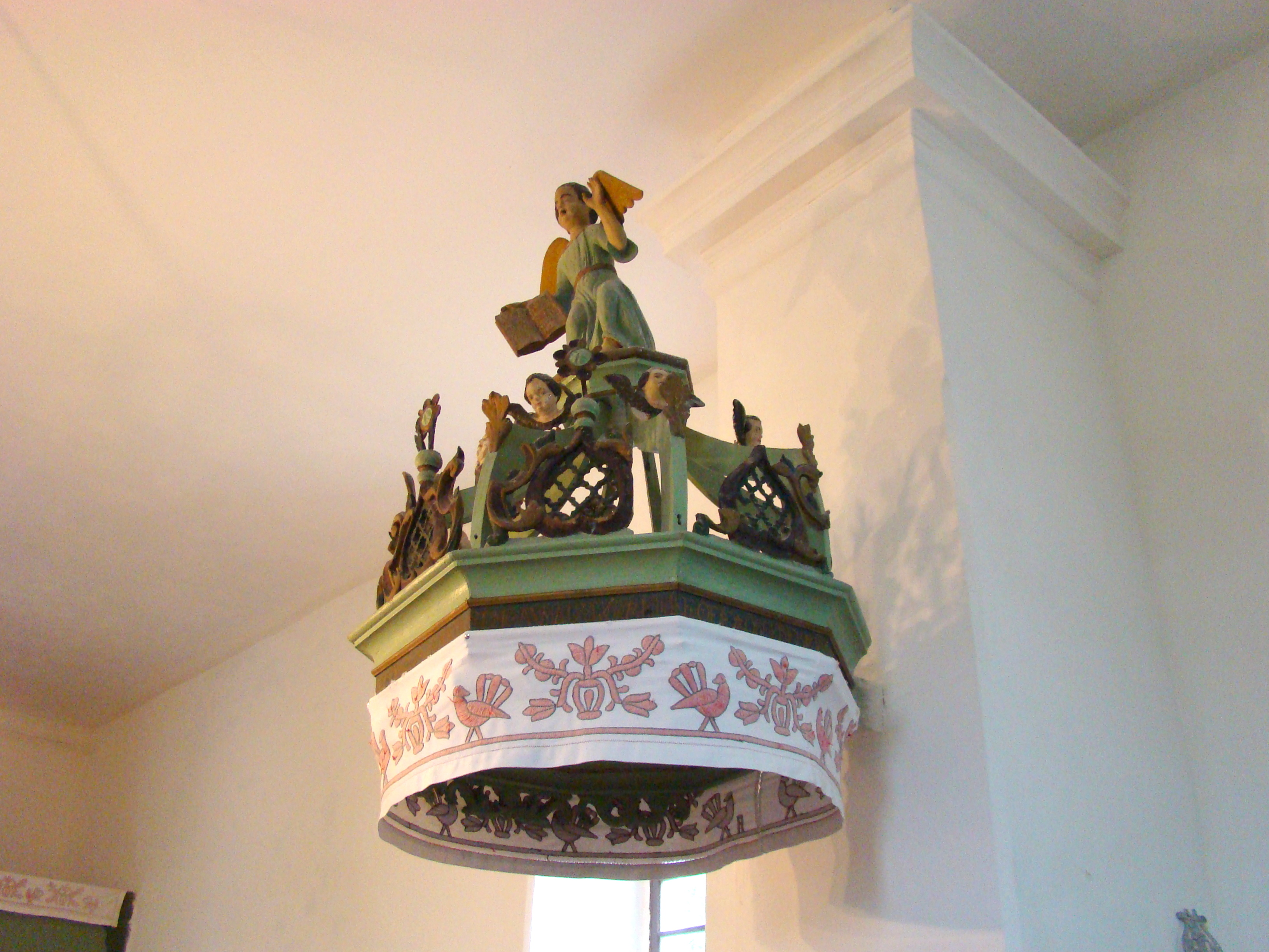 Biserica reformată din satul Răscruci; comuna Bonțida, județul Cluj